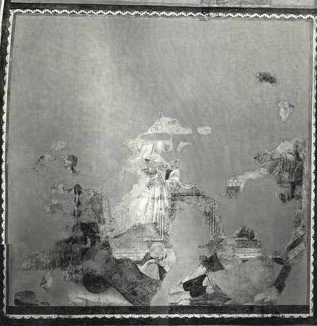 Giotto (attr.), resurrezione